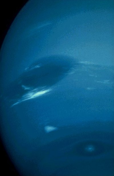 QT - Neptune détail crédit: NSSDC/NASA